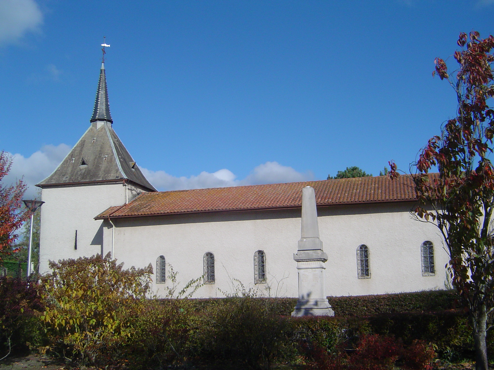 glèisa de St Gironç deu Camp; Vièla-St Gironç; Gasconha